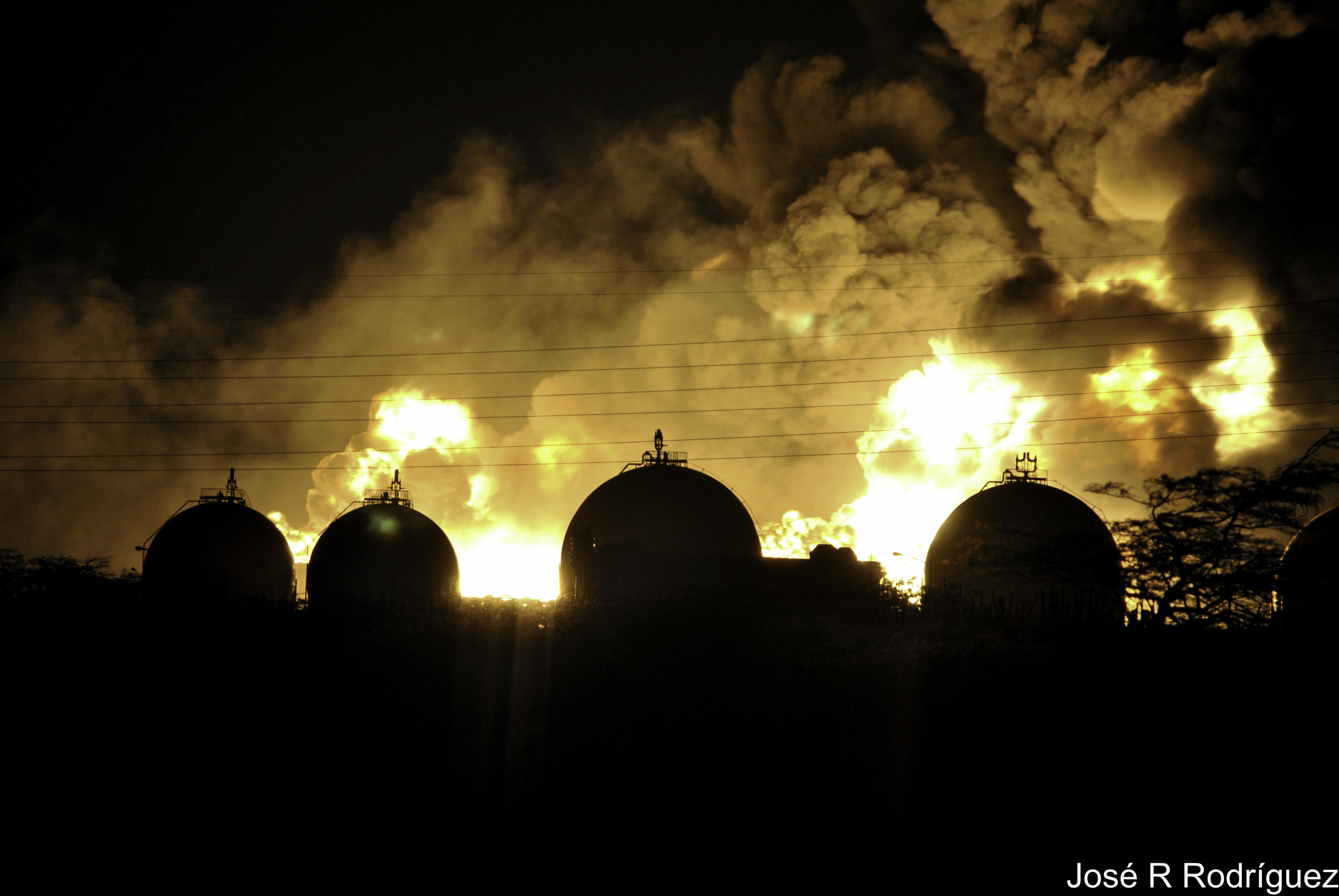 Imagen tomada desde la Calle Oeste #1 de Judibana, al borde de la zona de seguridad.